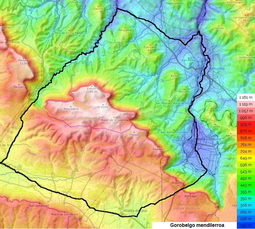 Gorobelgo mendilerroaren mapa topografikoa.